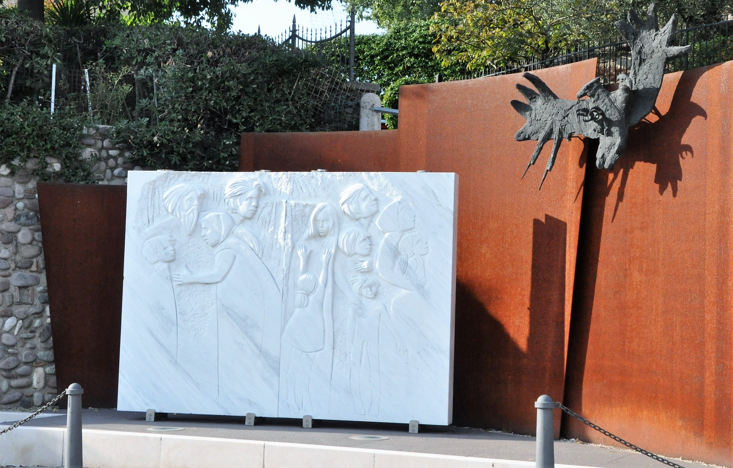 Moderna rievocazione in chiave artistica di un funesto fatto storico avvenuto nel lontano 1848. L'artista ha interpretato l'avvenimento traendo ispirazione da altri artisti come il Guernica di Picasso.Su di una lastra di marmo bianco è rappresentata la tensione e la paura degli abitanti di Castelnuovo. Il potere è rappresentato da un'aquila in ferro battuto. Impressiona e contrasta il bianco del marmo con il colore del ferro con il quale è trattata l'Aquila imperiale Austriaca. Il paese di Castelnuovo per la sua posizione si trovò al centro di quasi tutte le guerre per l'Indipendenza Italiana. Monumento moderno stupendo. This is a photo of a monument which is part of cultural heritage of Italy.